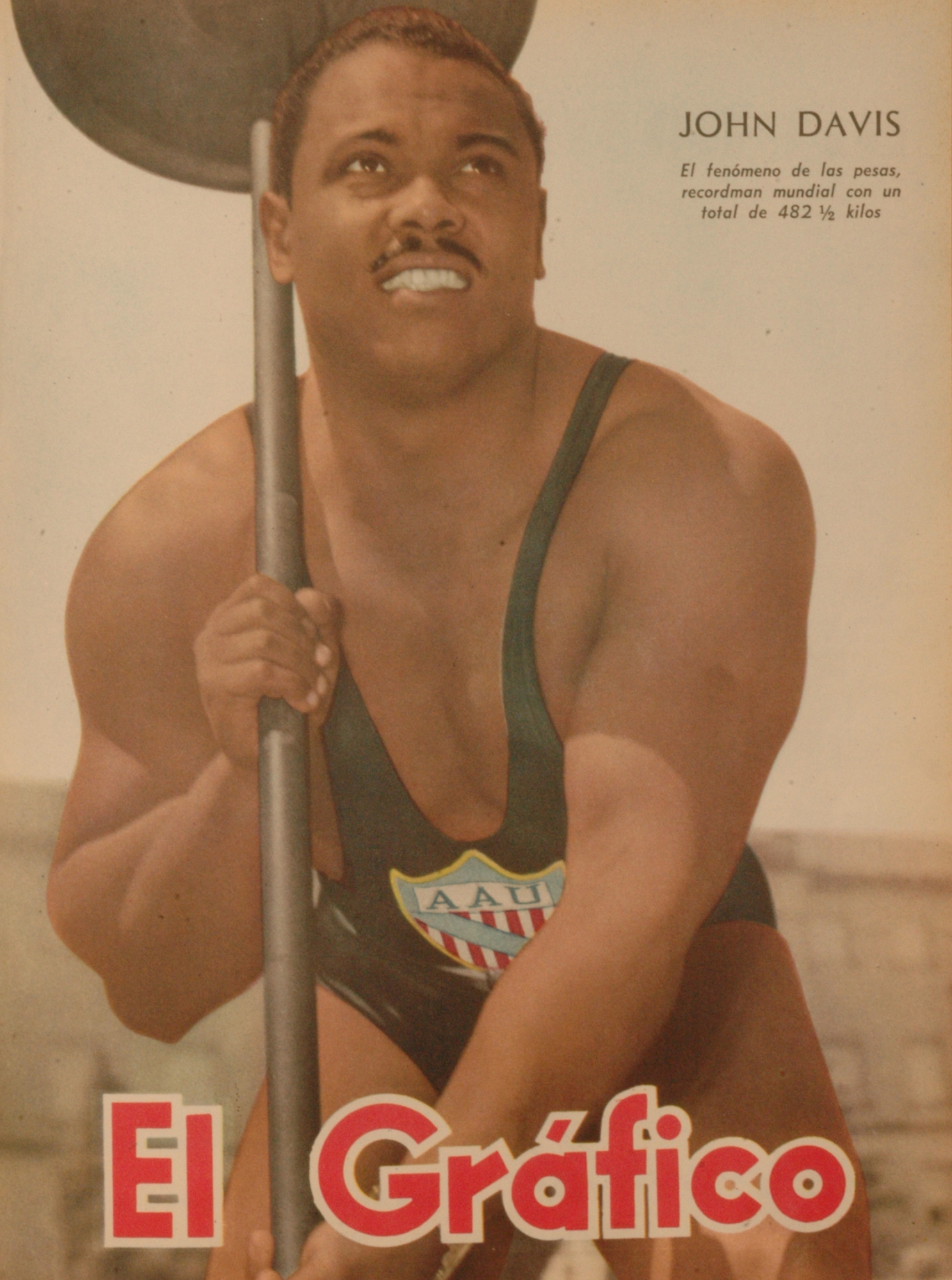 El Grafico del 23 de Marzo de 1951. Edicion 1650